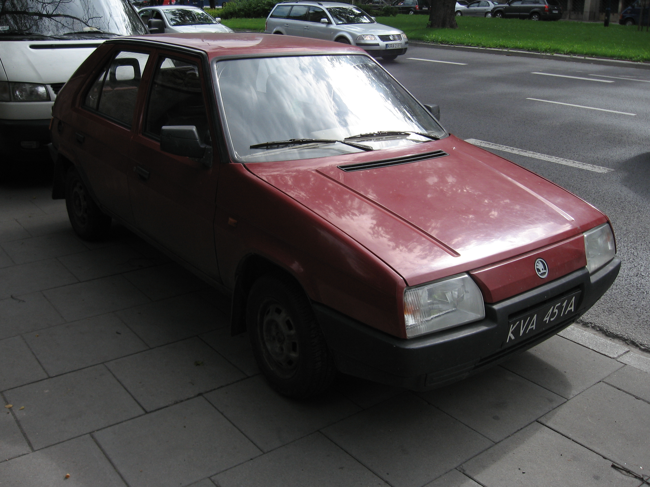 Škoda Favorit 136 L on Adama Mickiewicza avenue in Kraków.